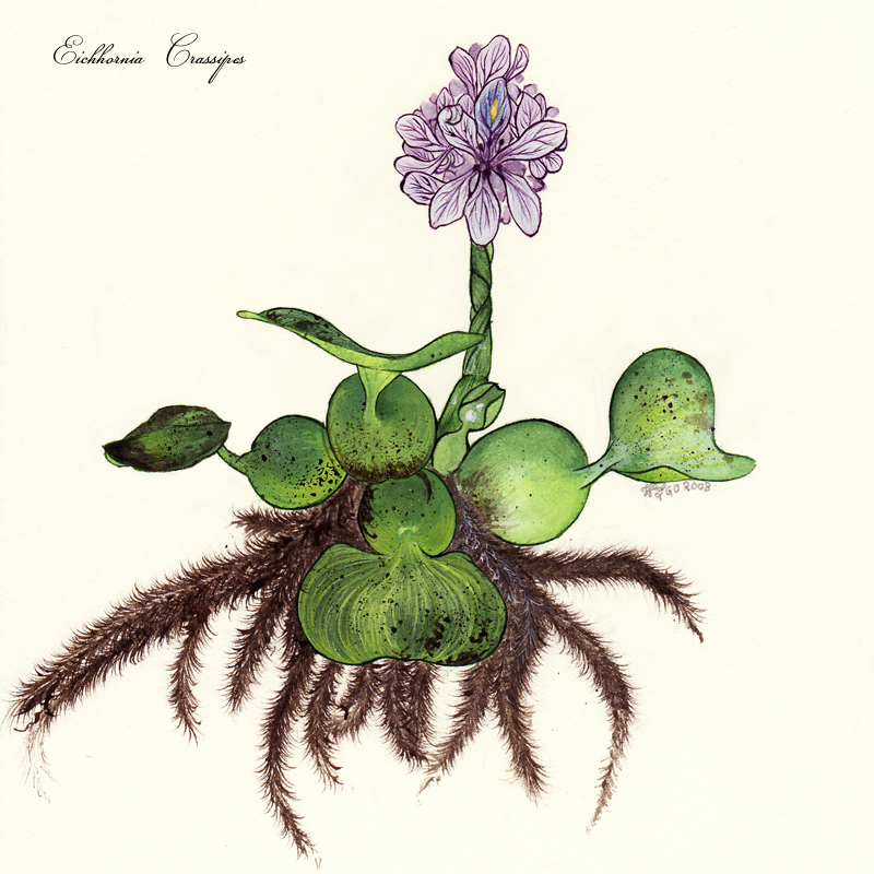 illustration eichhornia crassipes